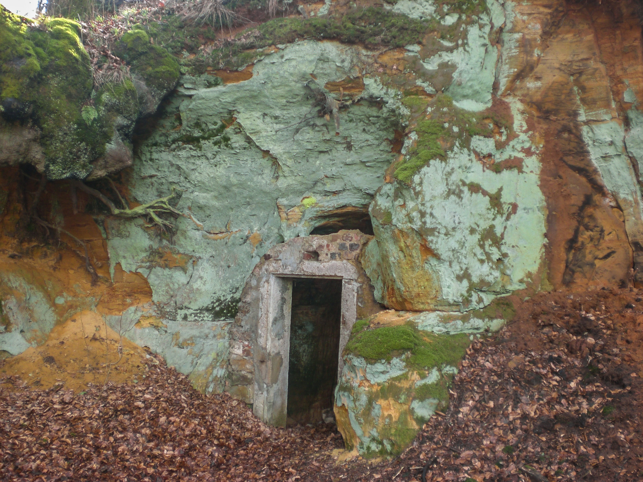 Hohlweg, Aufschluss, Gspannberg, Geotop